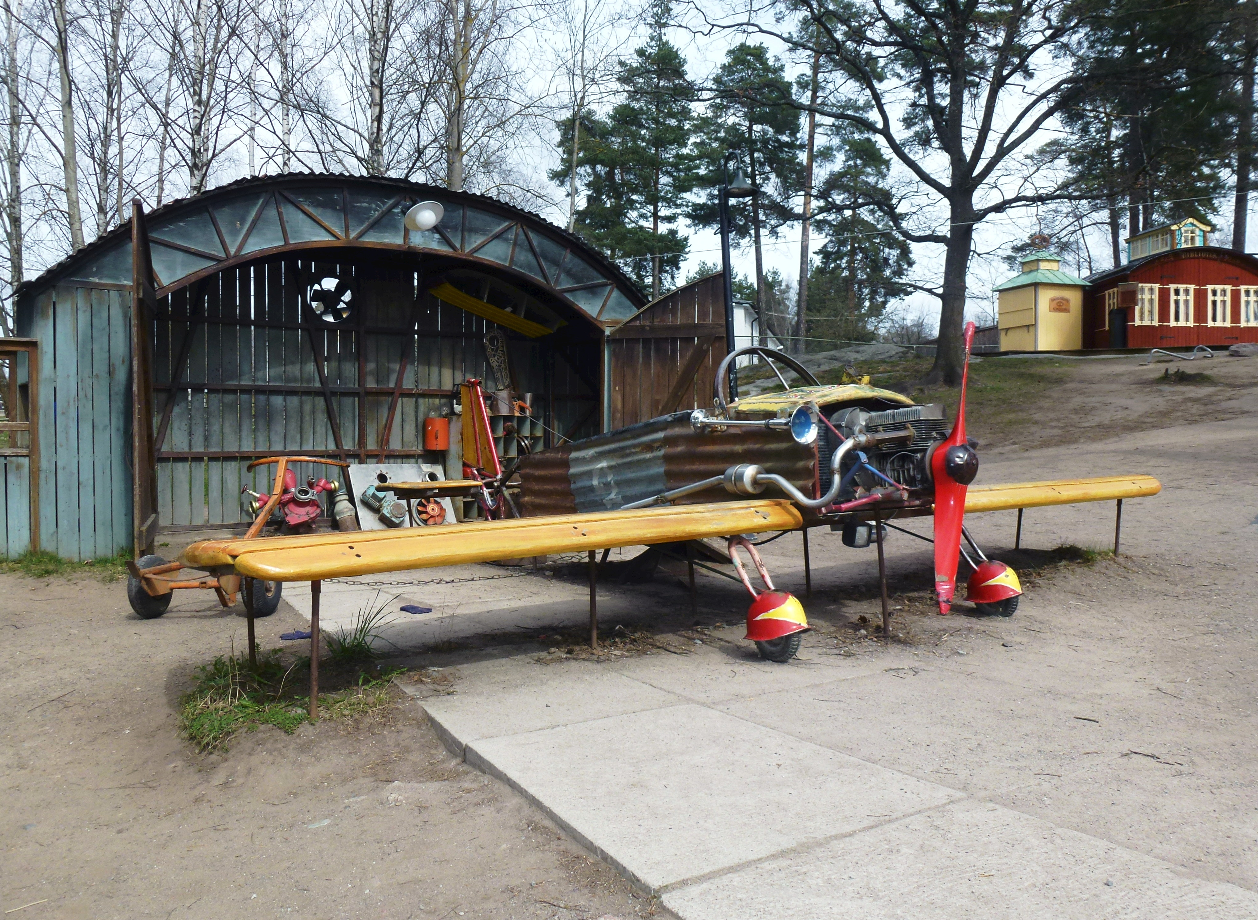 Mulle Meckparken i Solna